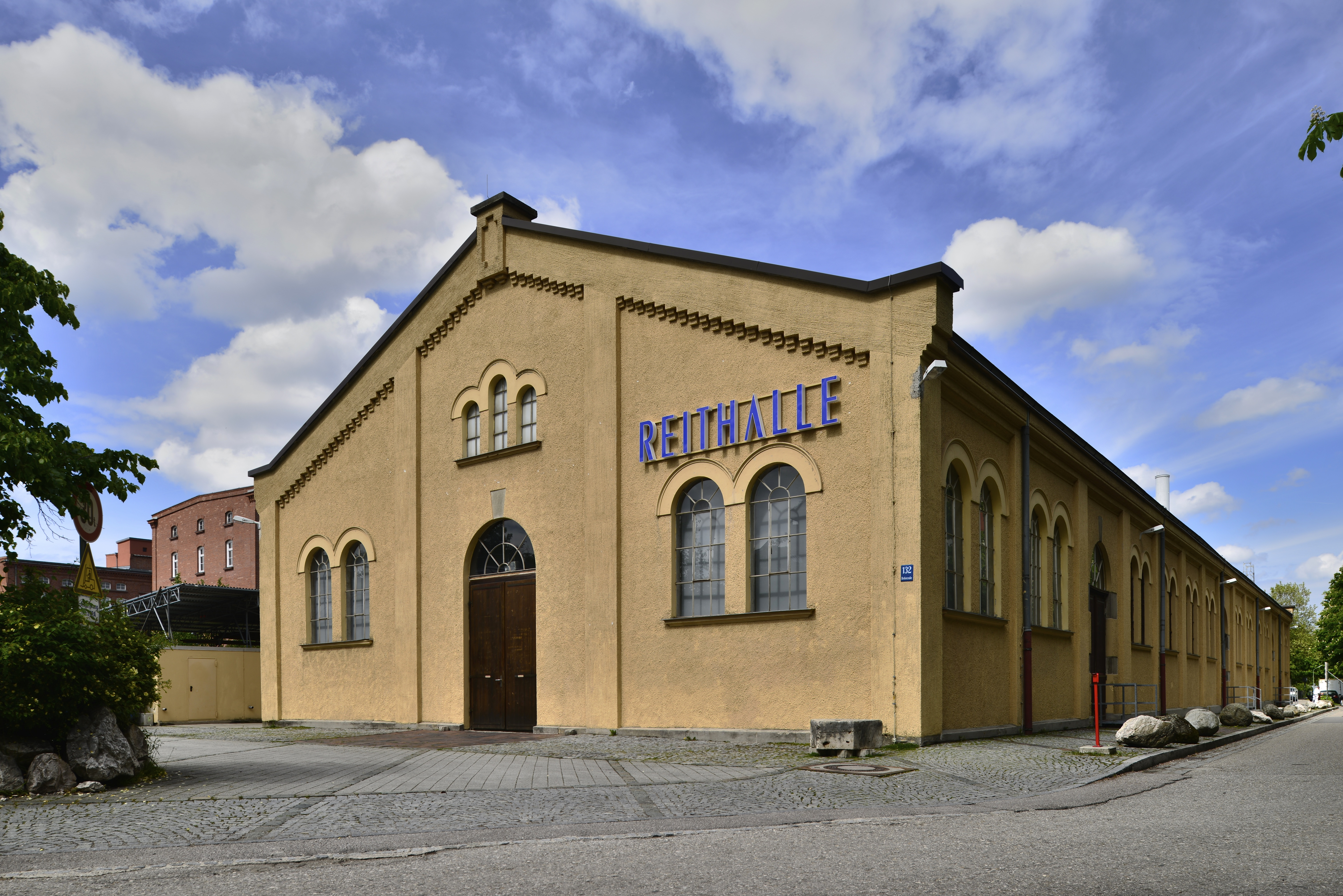 München, Schwabing West, Fassadenansicht Heßstraße 132, Die Reithalle.